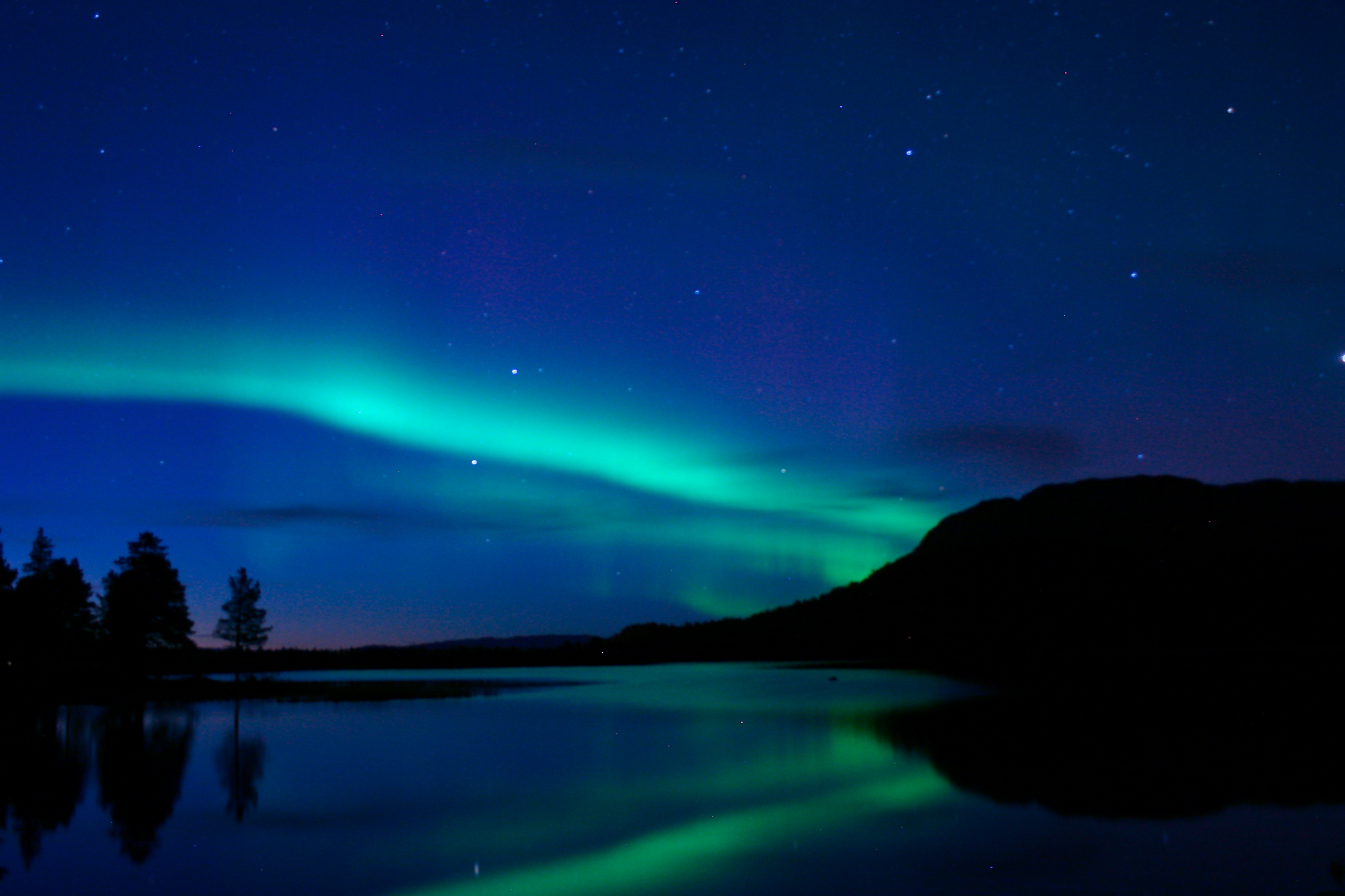 Nordlys ved Lillevannet i Alta.